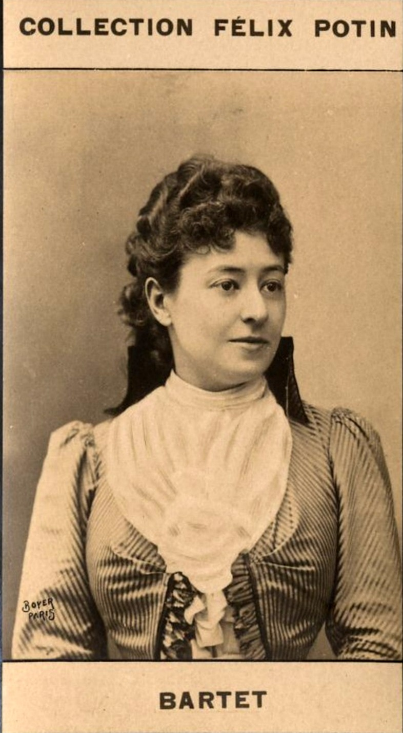 Bartet